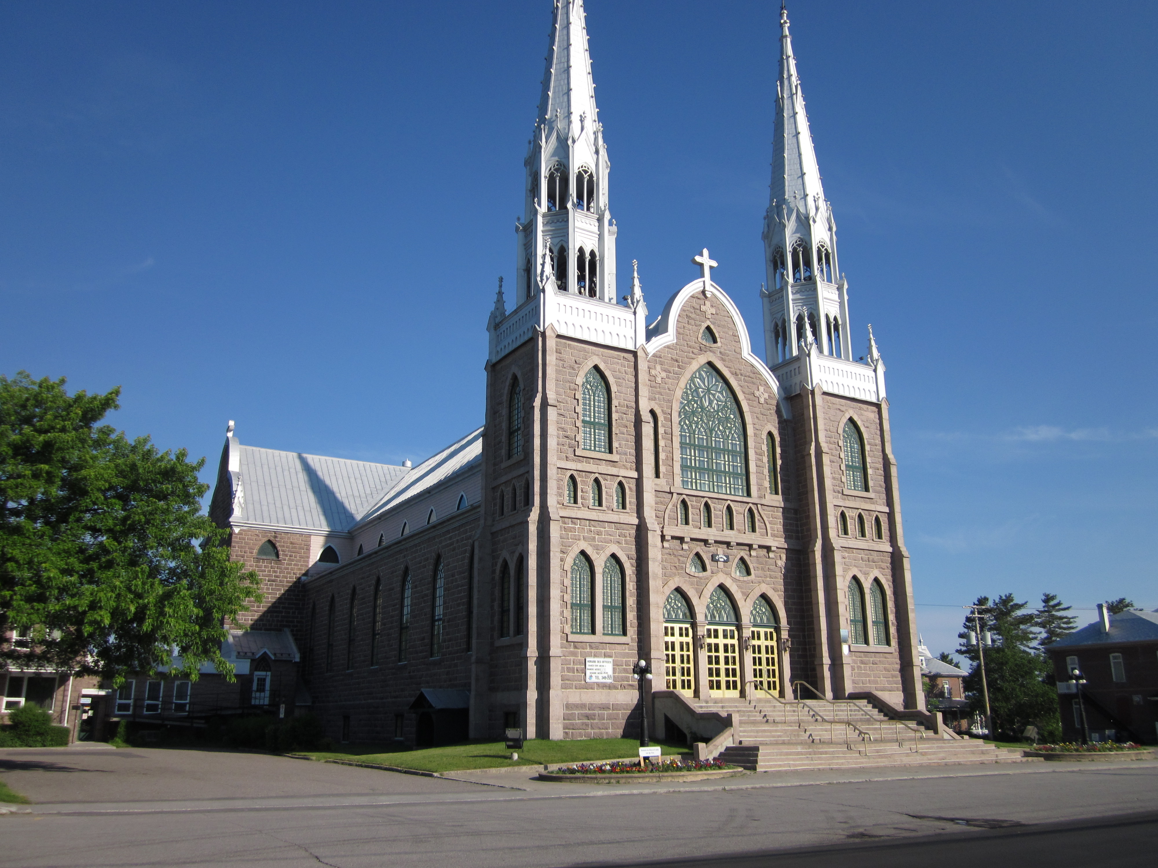 Église Saint-Jérôme de Métabetchouan